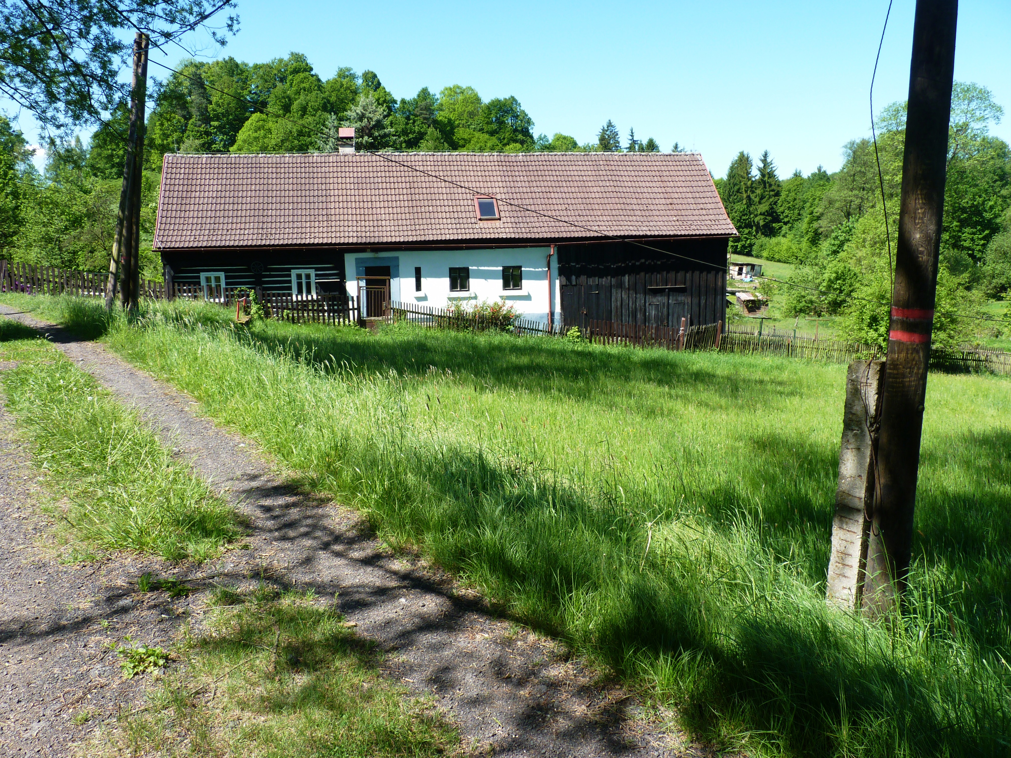 Přírodní rezervace Pekelský důl.